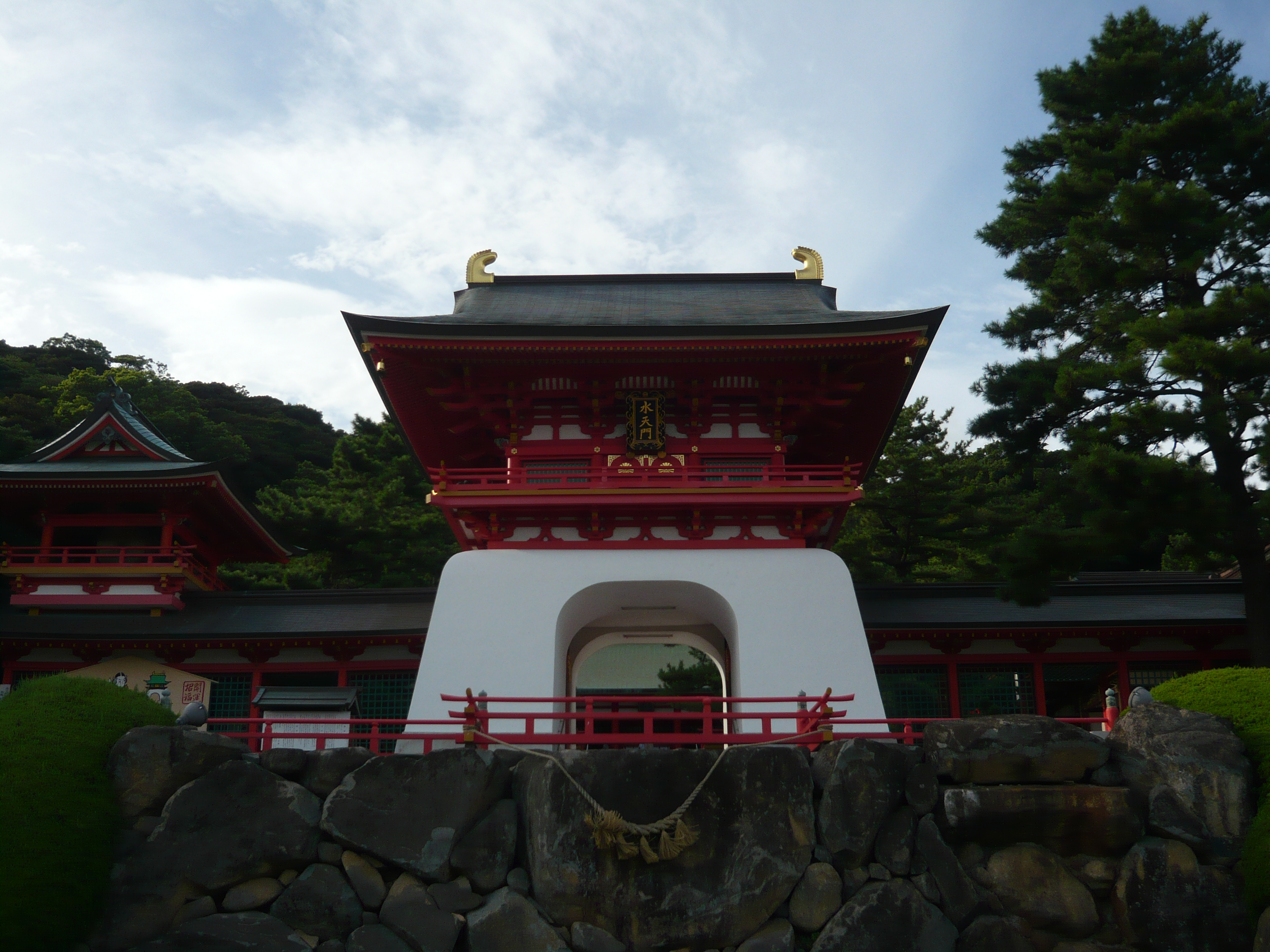 the Suiten-mon of Akama-jingū, Shimonoseki, Yamaguchi, Japan 赤間神宮（山口県下関市）水天門